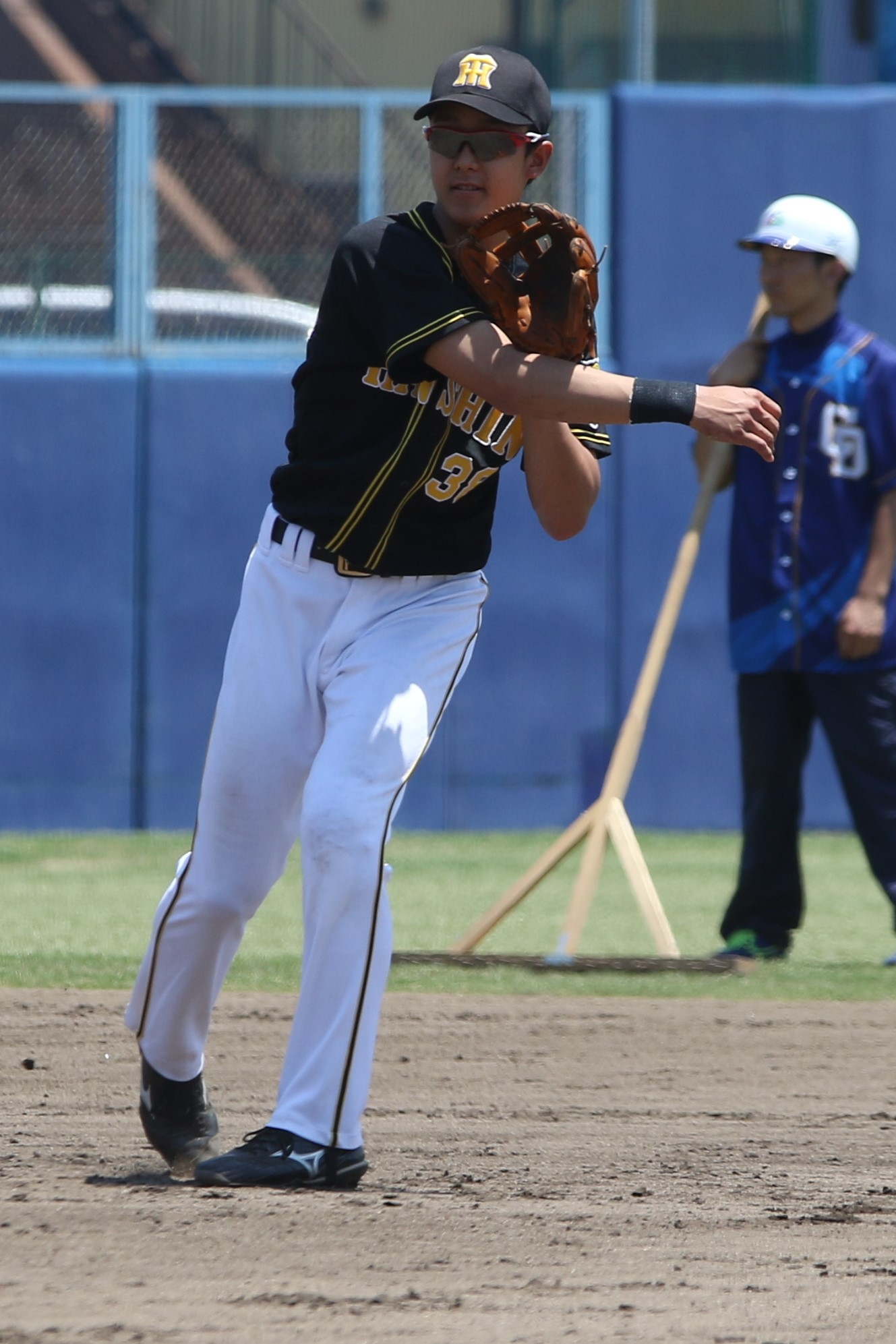 阪神タイガース時代 （2019年5月25日、ナゴヤ球場にて）